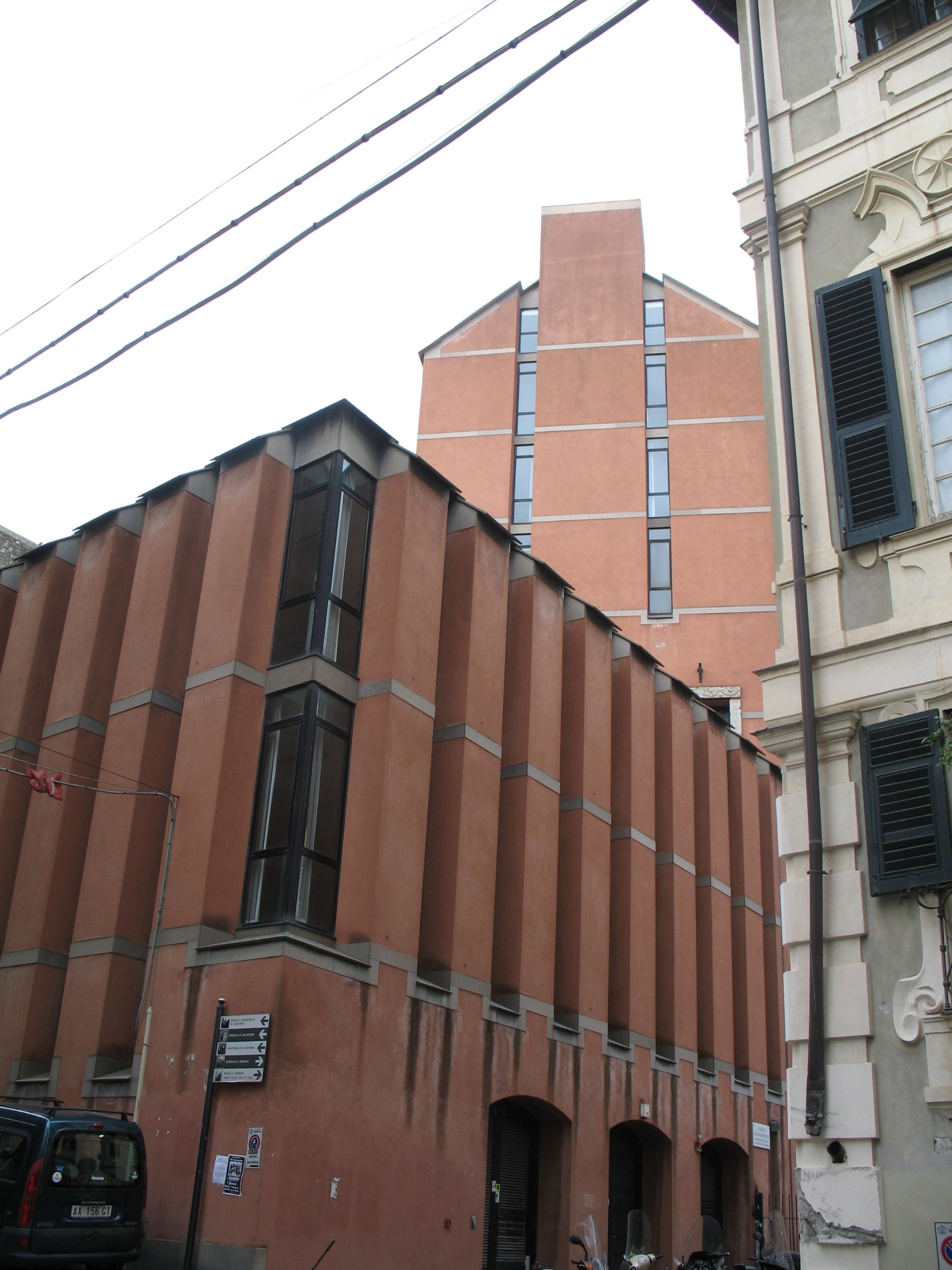 Genova, la sede della facoltà di architettura in stradone S. Agostino